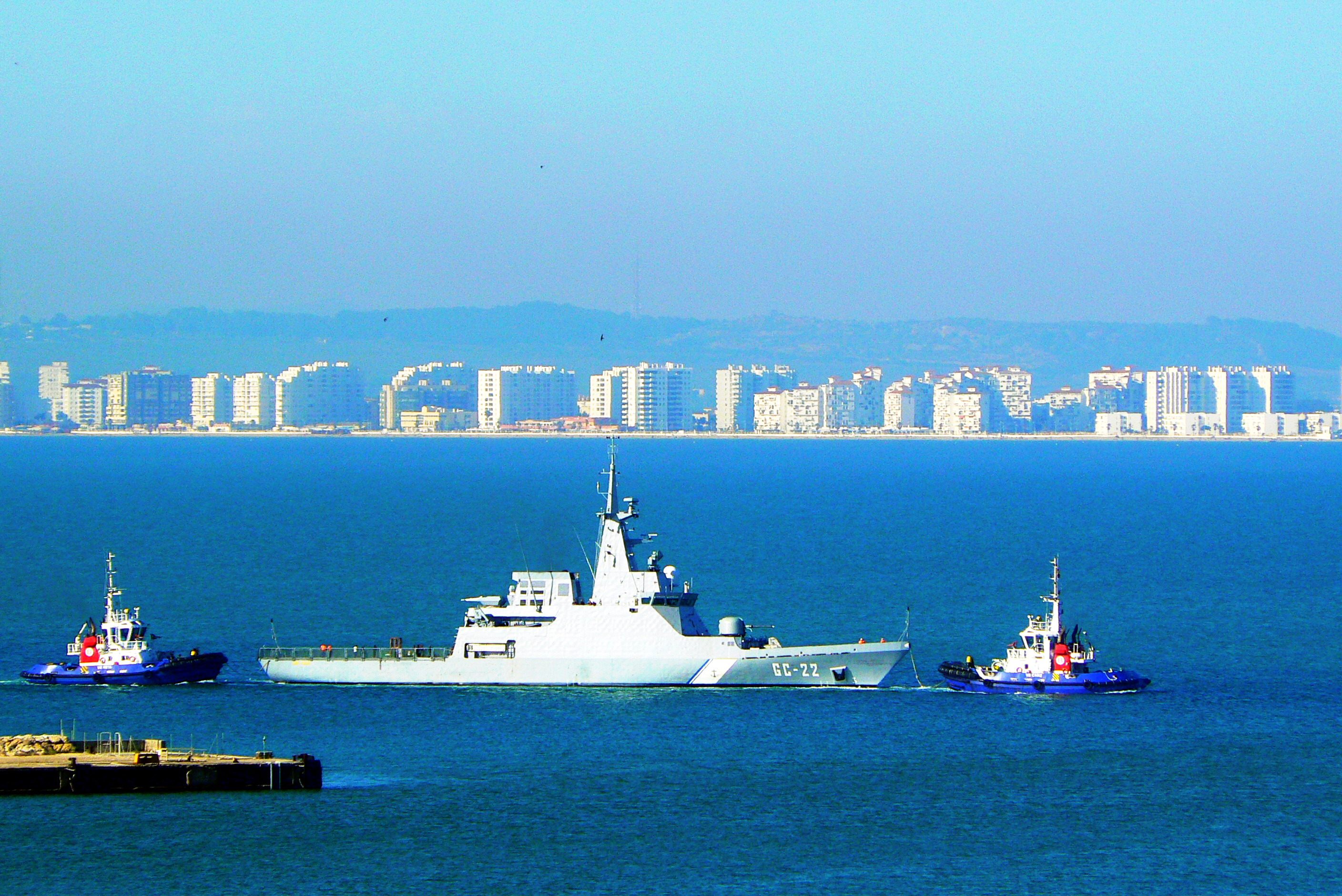 Naiguatá (GC-23) en sus pruebas de mar